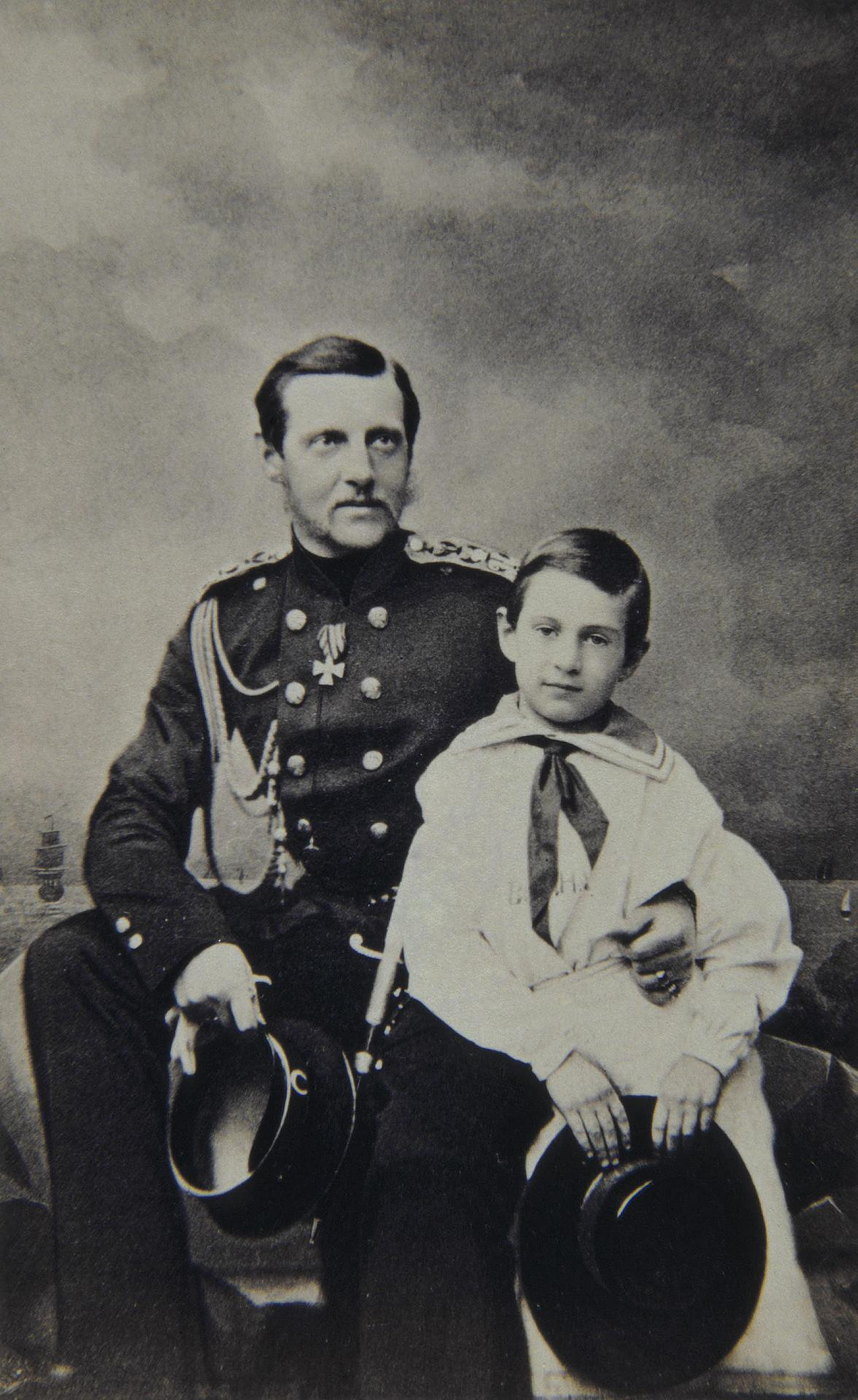 Портрет великого князя Константина Николаевича с сыном Константином